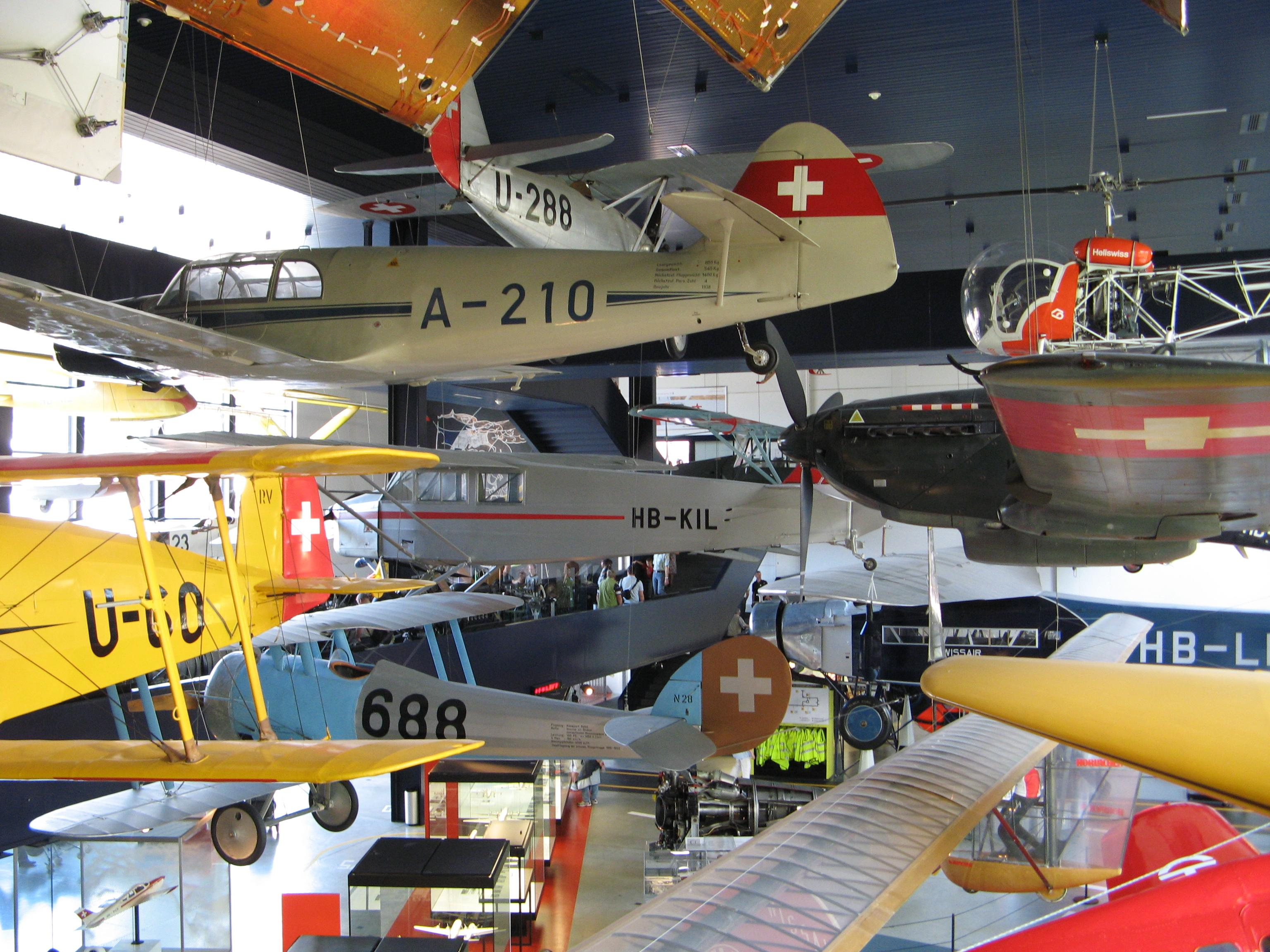 Swiss Transport Museum, Lucerne